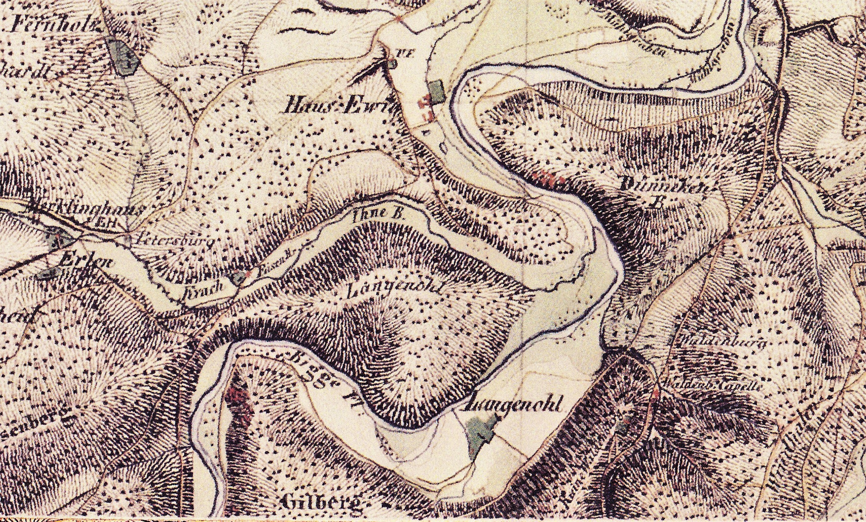 Kartenausschnitt aus dem Jahre 1836. Gut Langenohl im breiten Biggetal südlich von Kloster Ewig bei Attendorn. Die Gutsgebäude wurden 1961 abgerissen um der Biggetalsperre Platz zu machen.